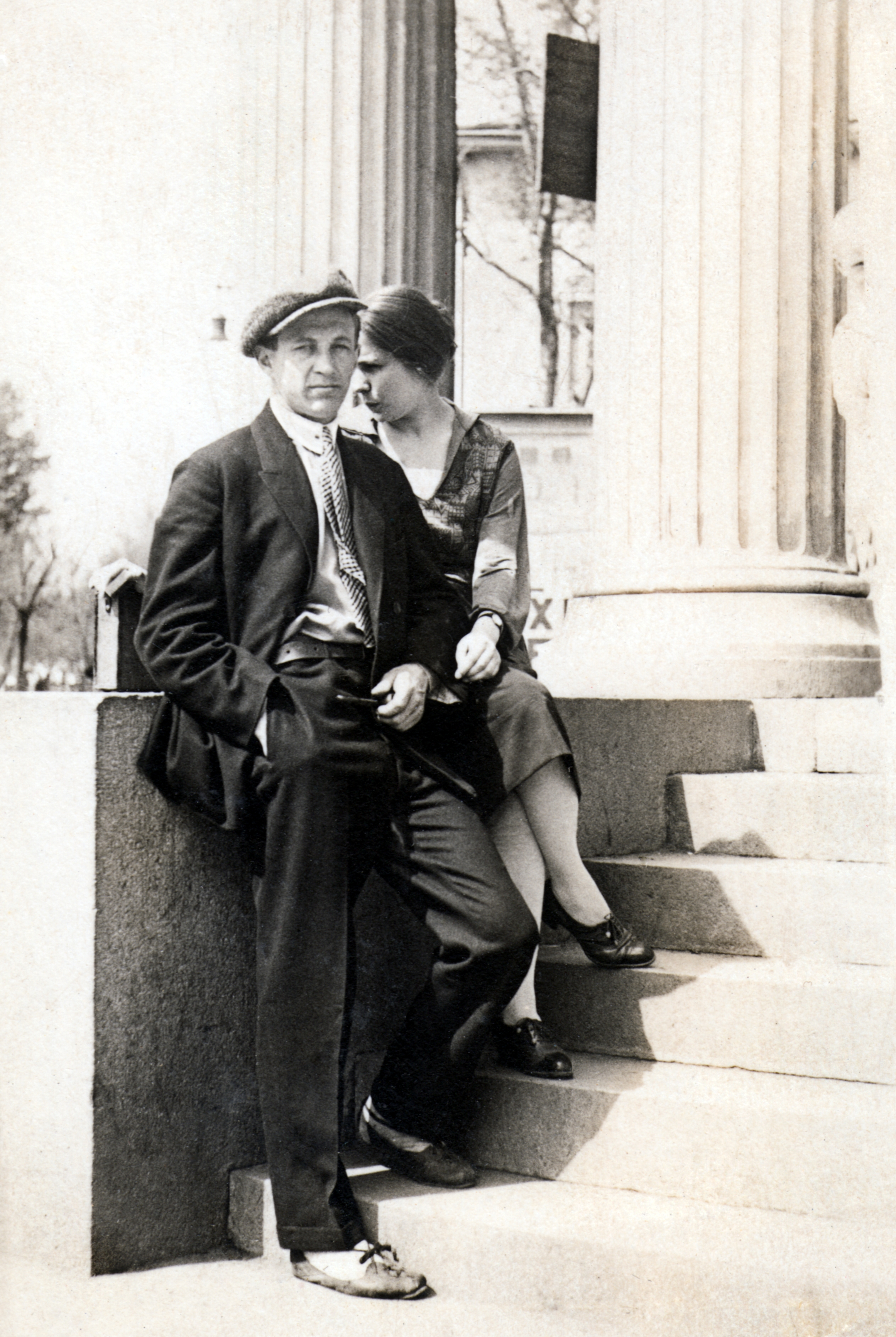 Сергей Иванович Маркин и Мария Семёновна Ильина на ступенях Колизея у Чистых прудов. Москва, 1929